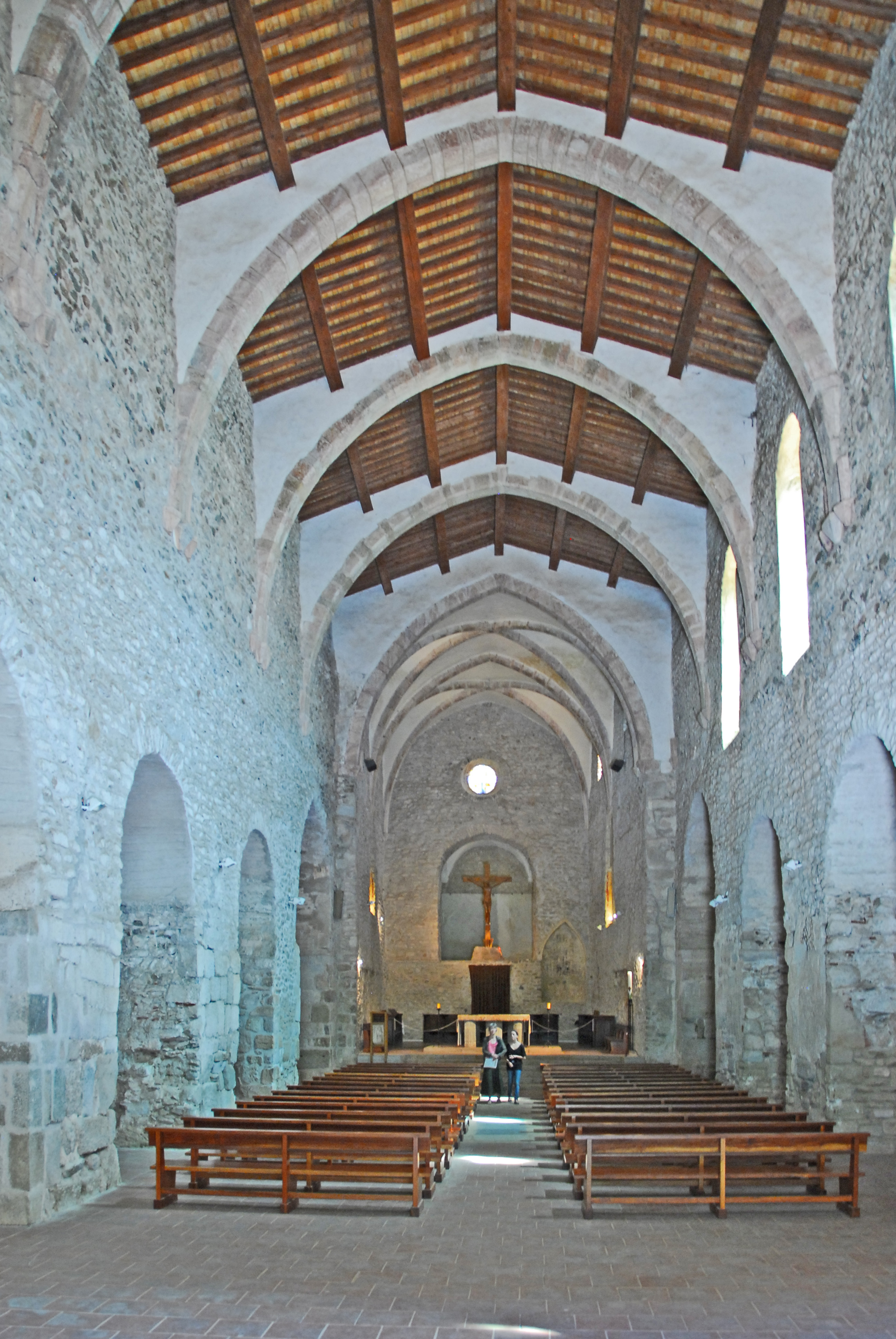 Abbaye de Cuxa, Michaelskirche, Mittelschiff zum Chor